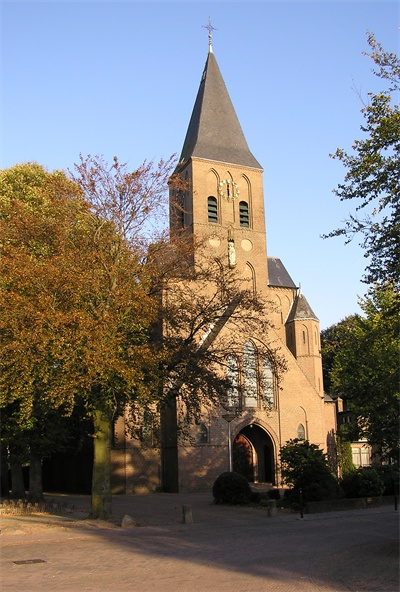 Hooglanderveen, Van Tuijllstraat 29 - Josephkerk - anno 1918